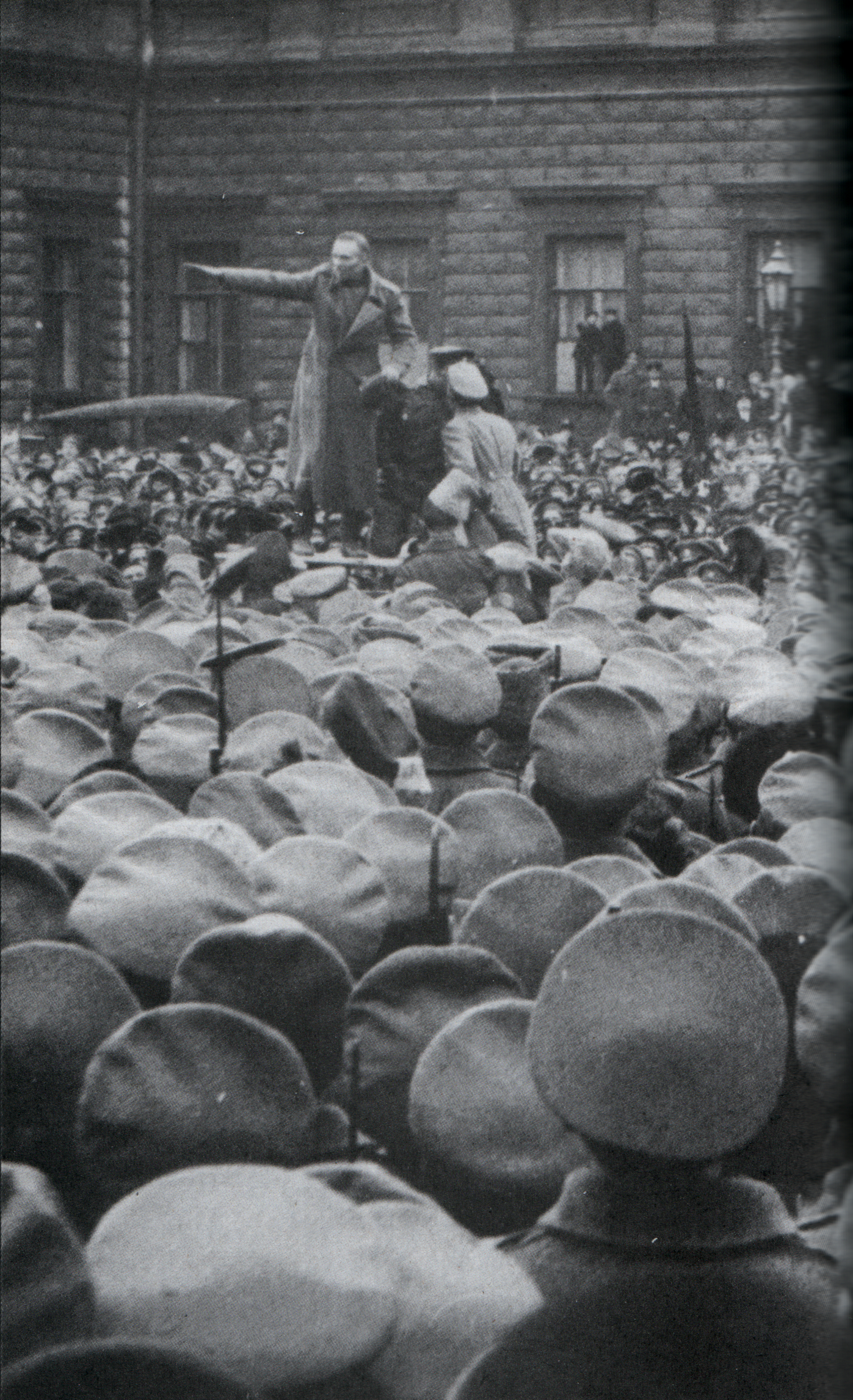 Fiódor Linde dirige a soldados del regimiento Finlandia hacia el Palacio Marinski, sede del Gobierno provisional, durante la Crisis de Abril (17 de mayo de 1917, 4 de mayo del calendario juliano).